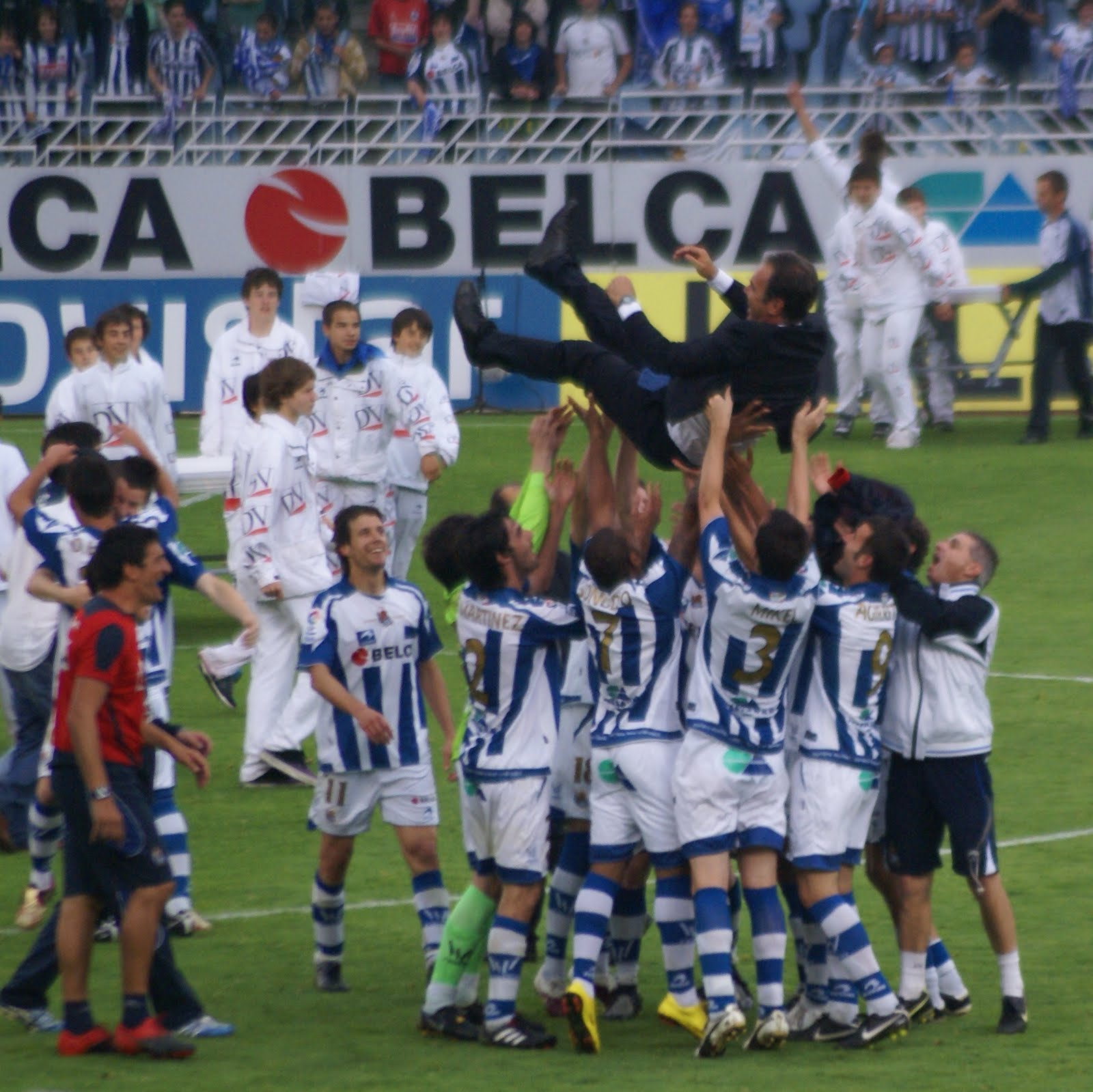 REAL SOCIEDAD 2-0 CELTA. LIGA ADELANTE - JORNADA 41. Jugadores de la Real Sociedad mantean al técnico Martín Lasarte tras conseguir ascenso a Liga BBVA.